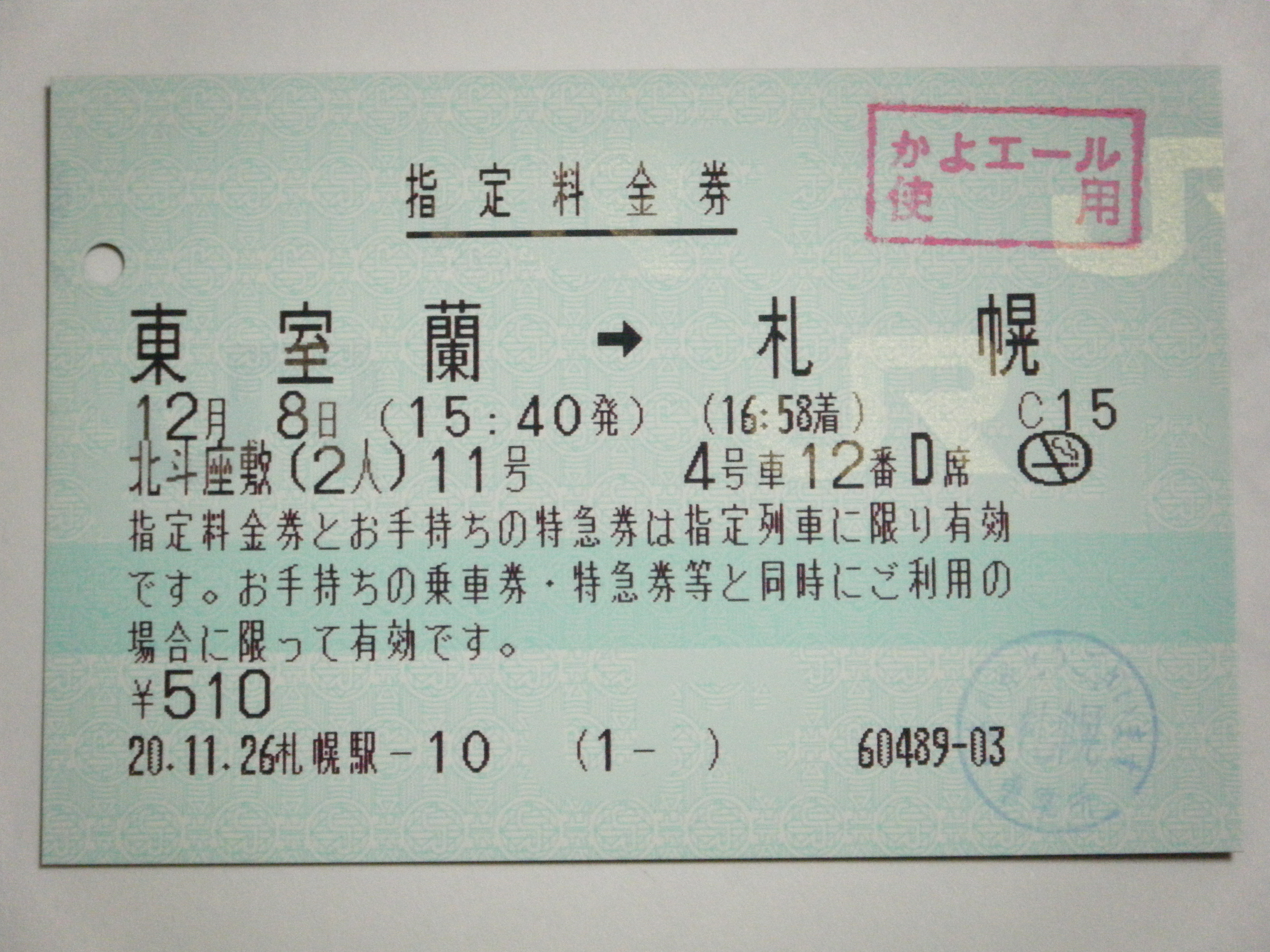 特急北斗の座敷車連結時の指定席券